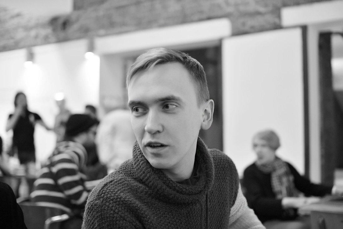 Валерий Печейкин, ГОГОЛЬ-ЦЕНТР/GOGOL-CENTER, Москва